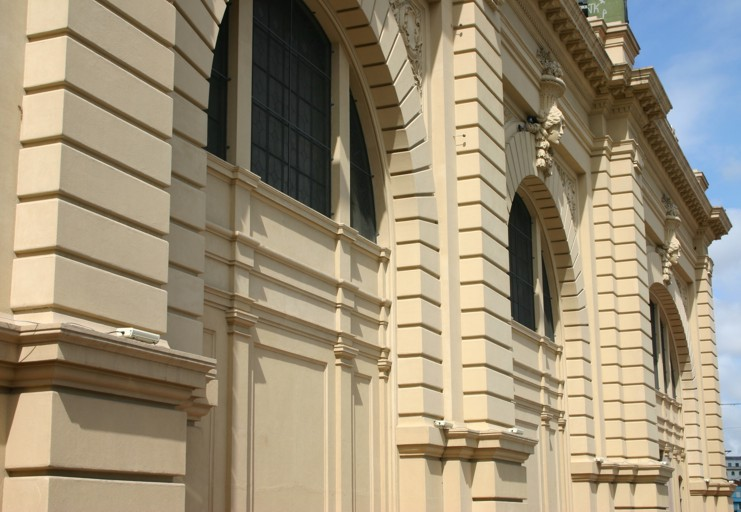 Fachada restaurada do Mercado Municipal de São Paulo (Foto: Marcos Silveira)